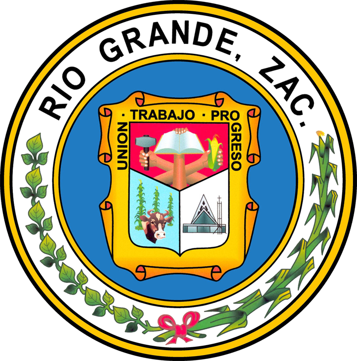 Escudo Municipal de Río Grande, ZAC. México.